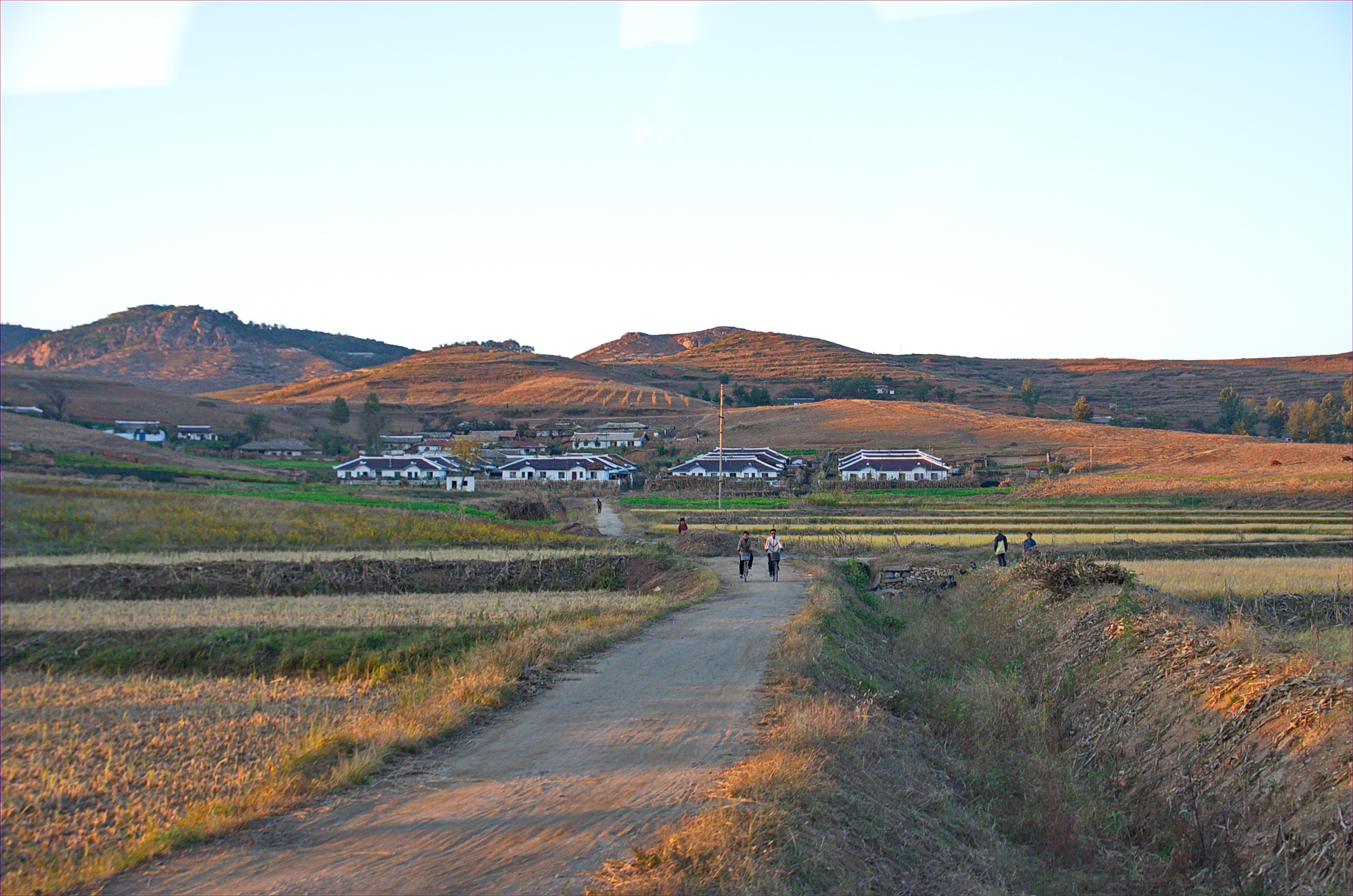 Nordkorea 2015 - bei Kangso